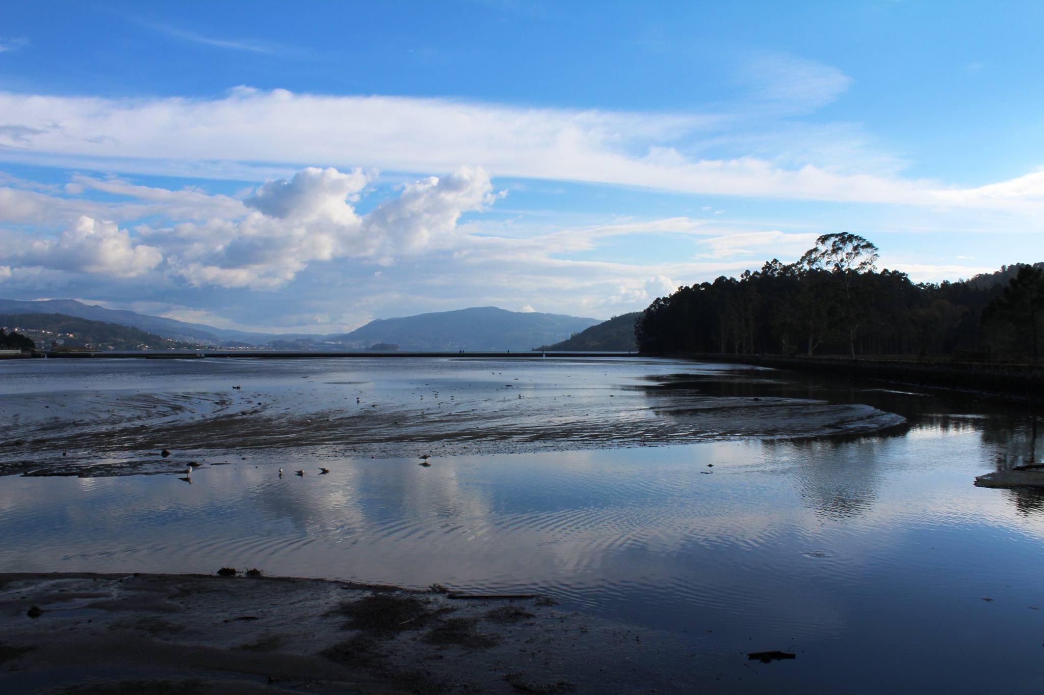 Salinas de Ulló, na parroquia de Paredes, en Vilaboa, Pontevedra. A marisma que se forma entre varios regatos que drenan á enseada de San Simón foi aproveitada durante séculos para extraer sal.